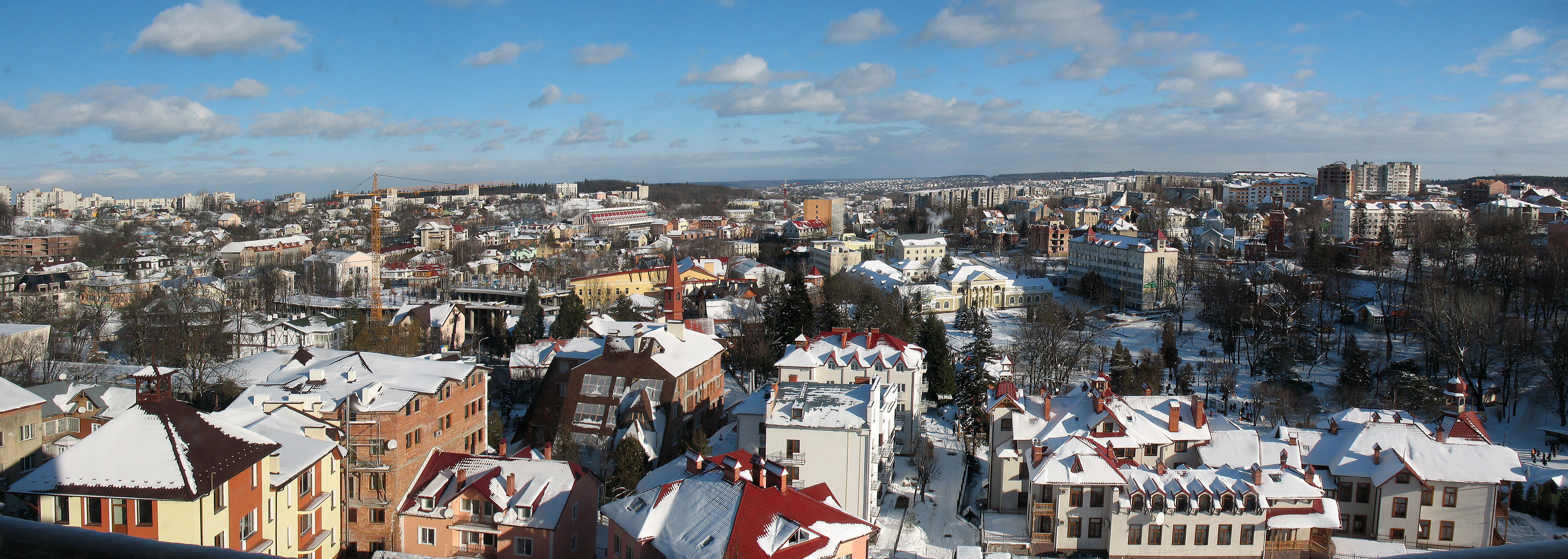 Панорама Трускавца